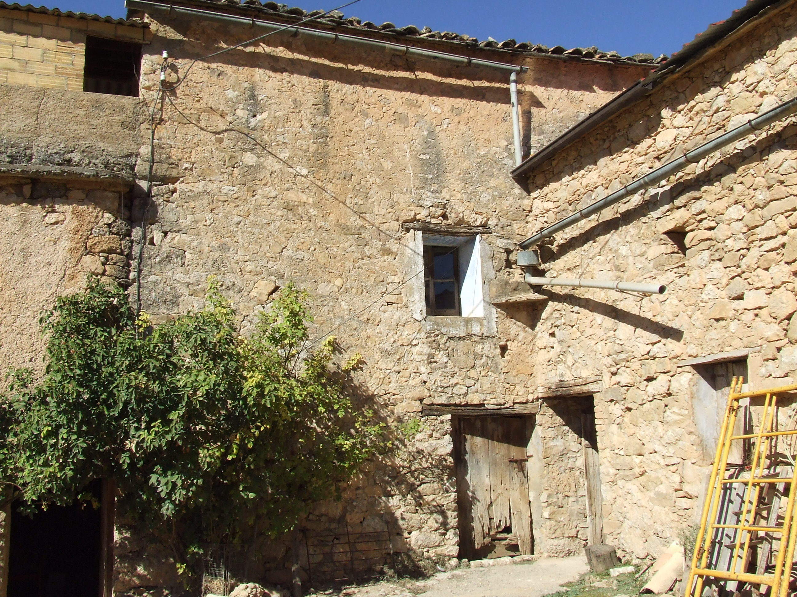 Can Carreu (Abella de la Conca, Pallars Jussà)